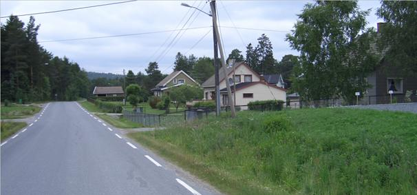 Holmenbyen på Lierfoss i Aurskog-Høland kommune.